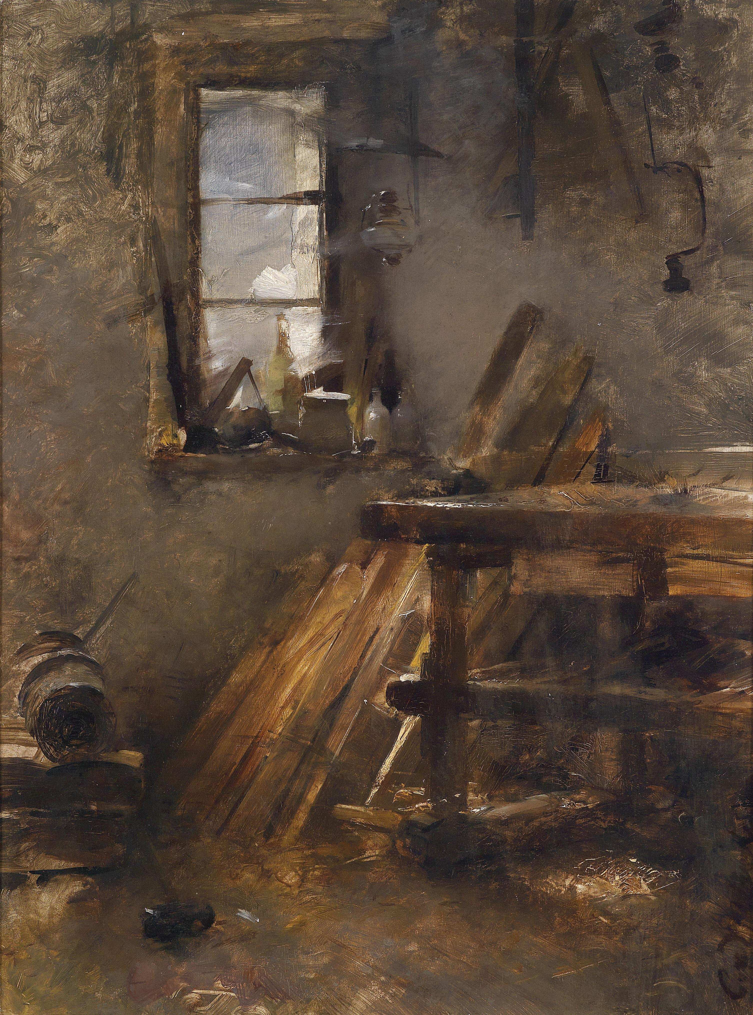 Motiv aus einer Wagner-Werkstätte